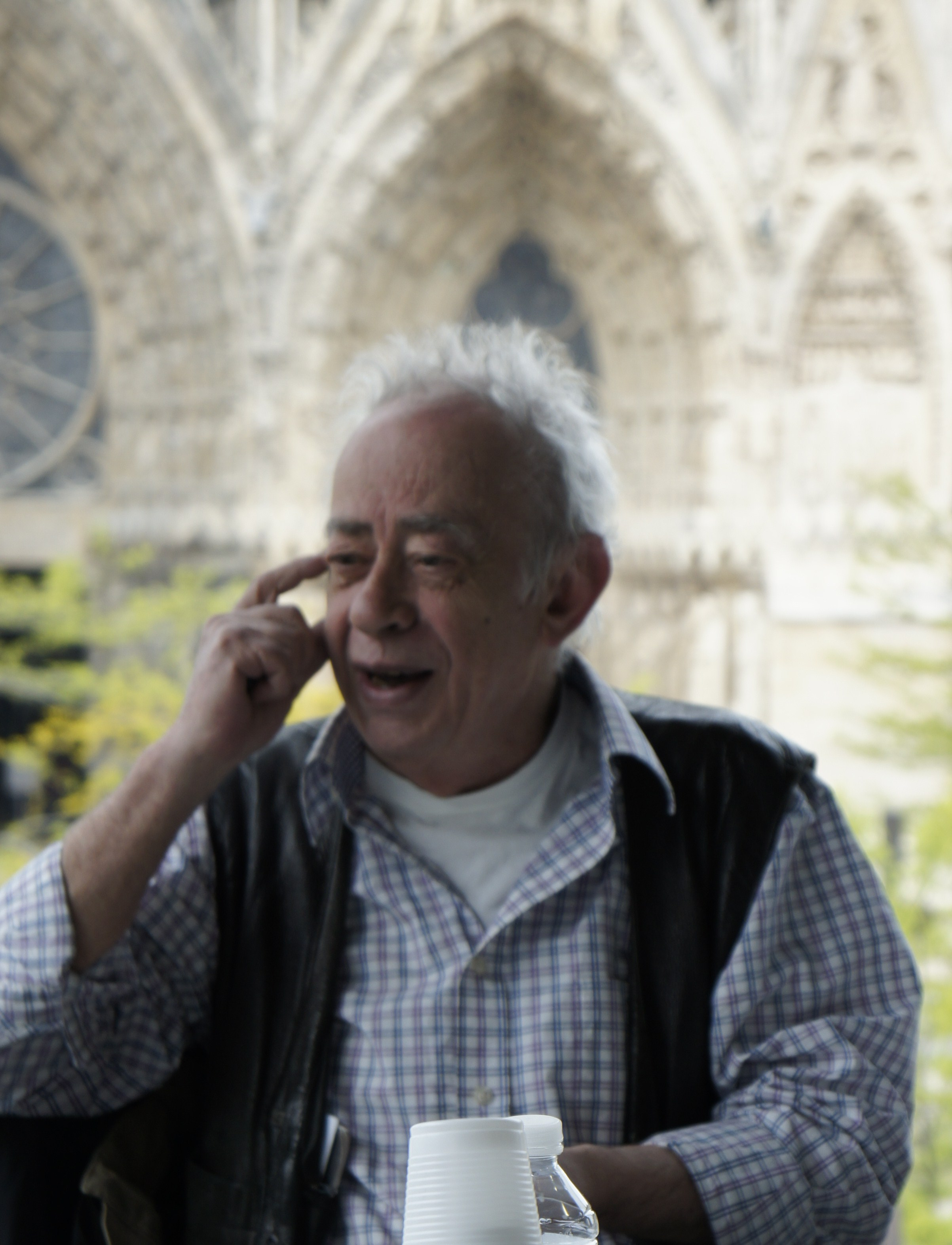 V. Alexakis, dédicaces et entretient, médiathèque Jean Falala en 2013.